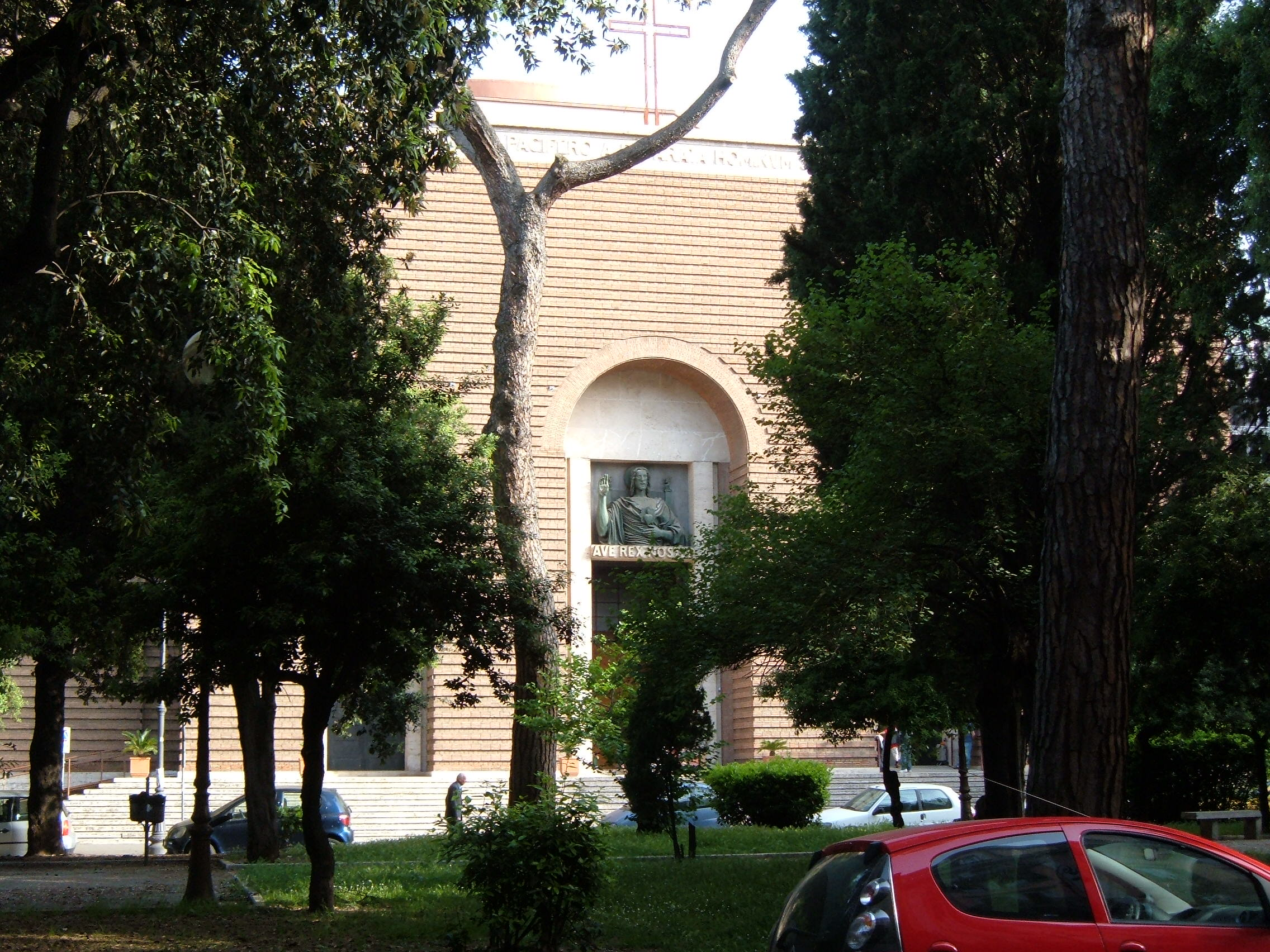 Chiesa del Sacro Cuore di Cristo Re, a Roma, nel quartiere Della Vittoria.